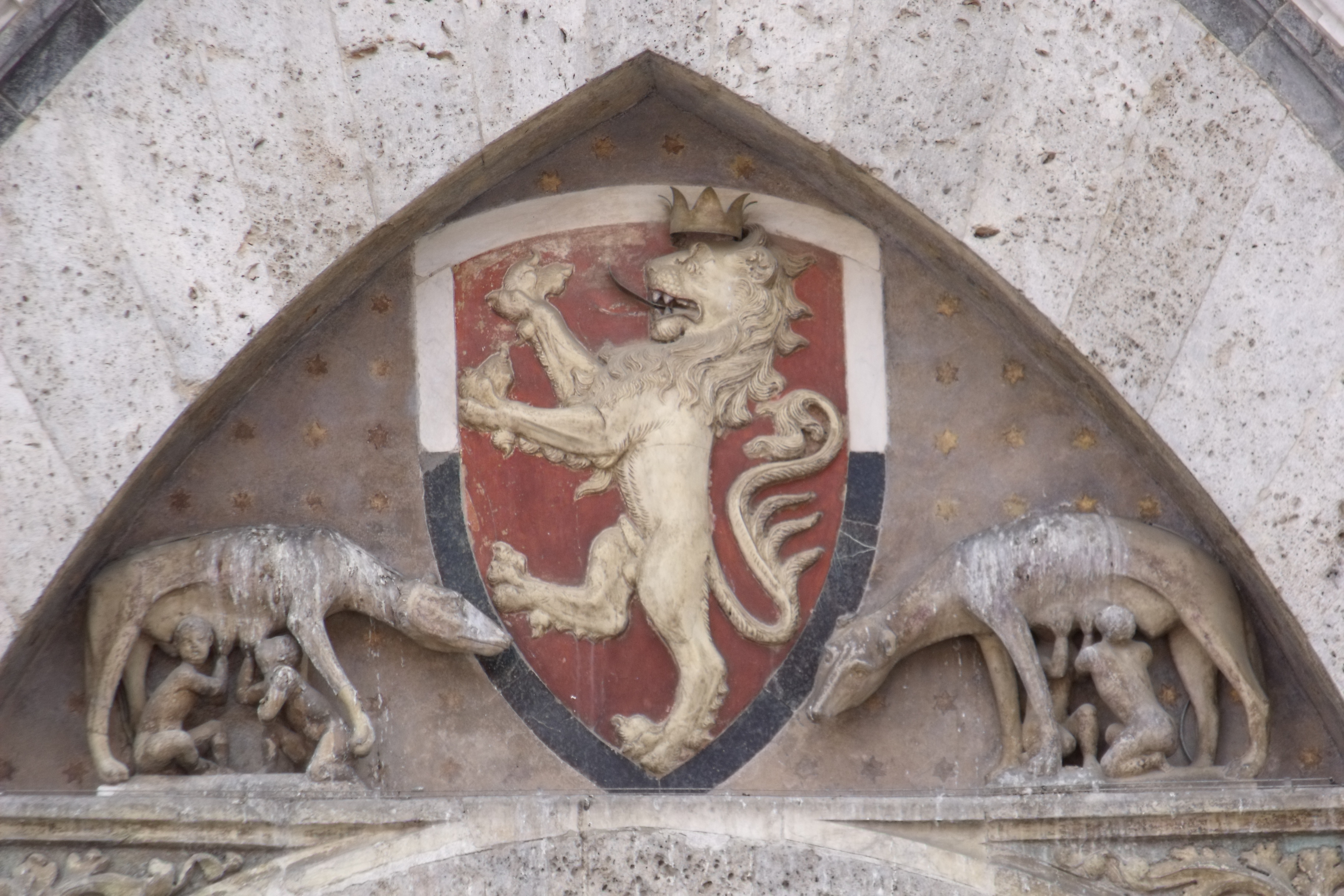 Stemma del Capitano e Lupe romane, Palazzo Pubblico Siena, opera di Agostino di Giovanni